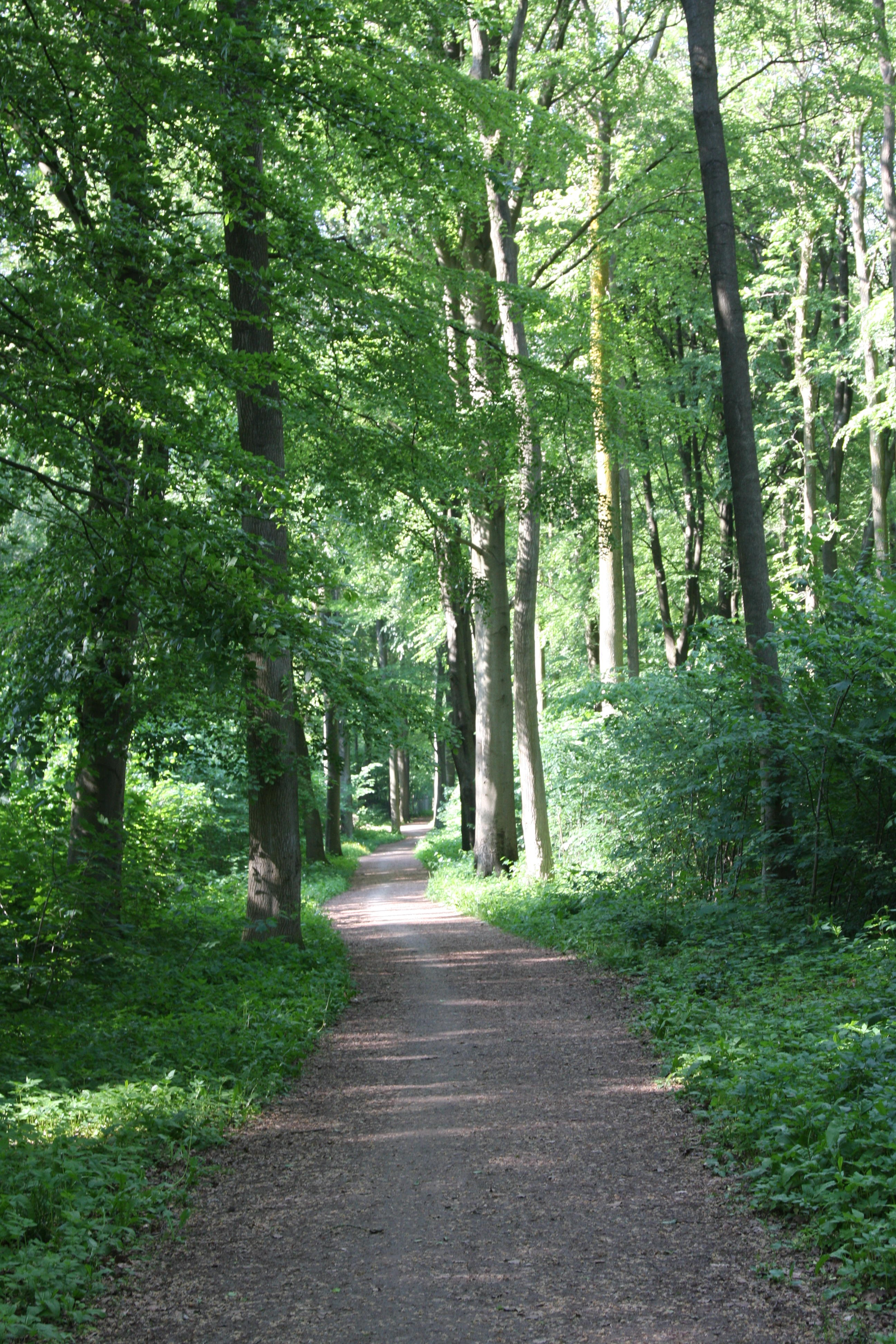 Hunderupskov / Hunderup Wood in Odense, Denmark